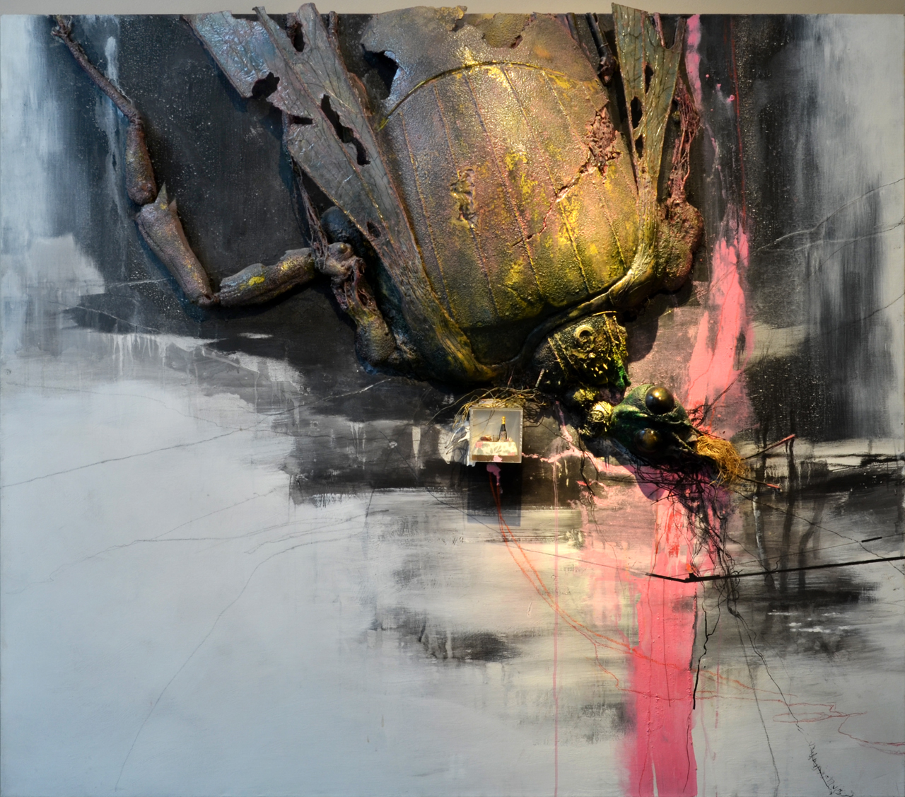 Bedřich Dlouhý, Poslední večeře (2011), kombinovaná technika